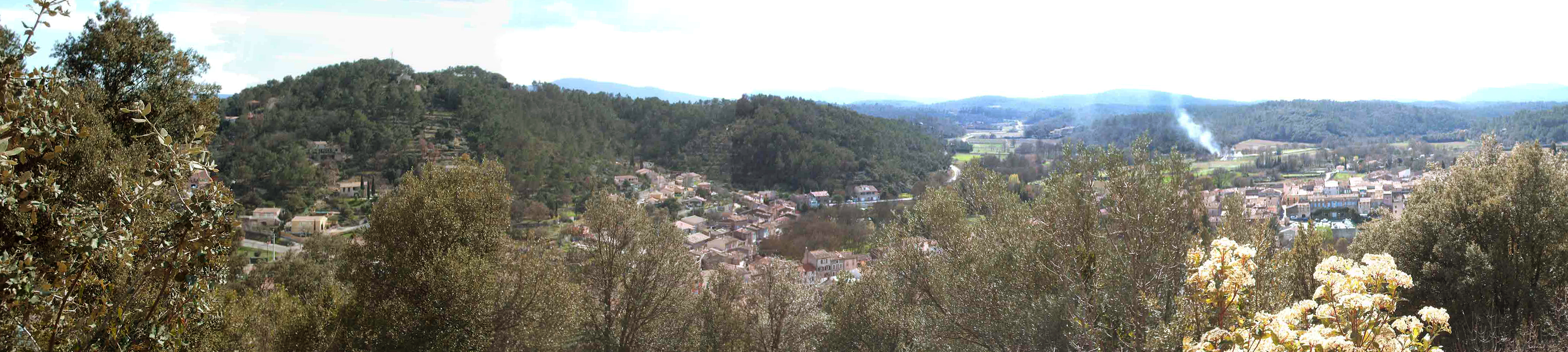 jean paul barbero